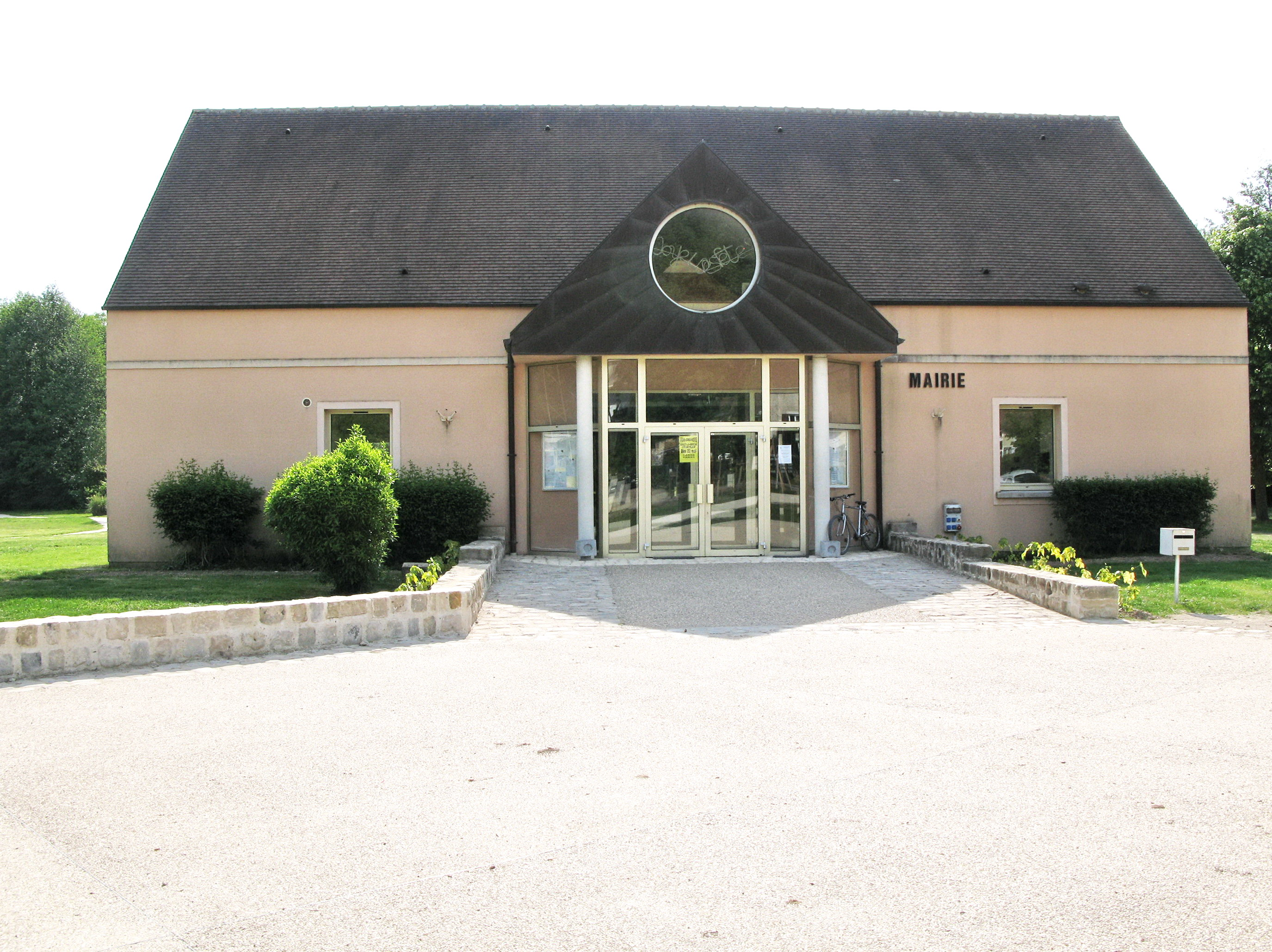 Mairie de Souzy-la-Briche (Essonne)